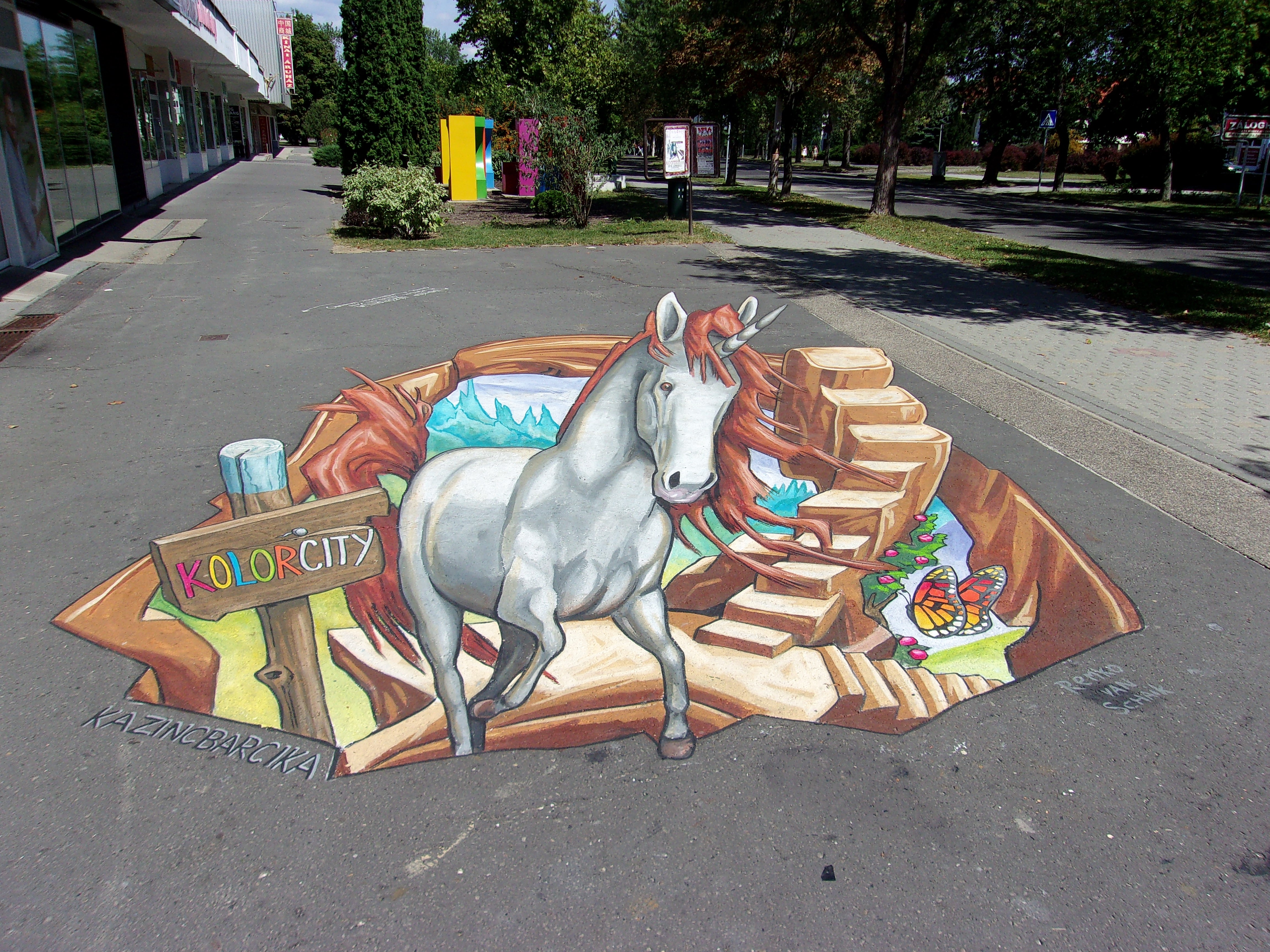 Kazincbarcika, Fő tér 2. - Remko Van Schaik: 3D unikornis (aszfaltfestés)